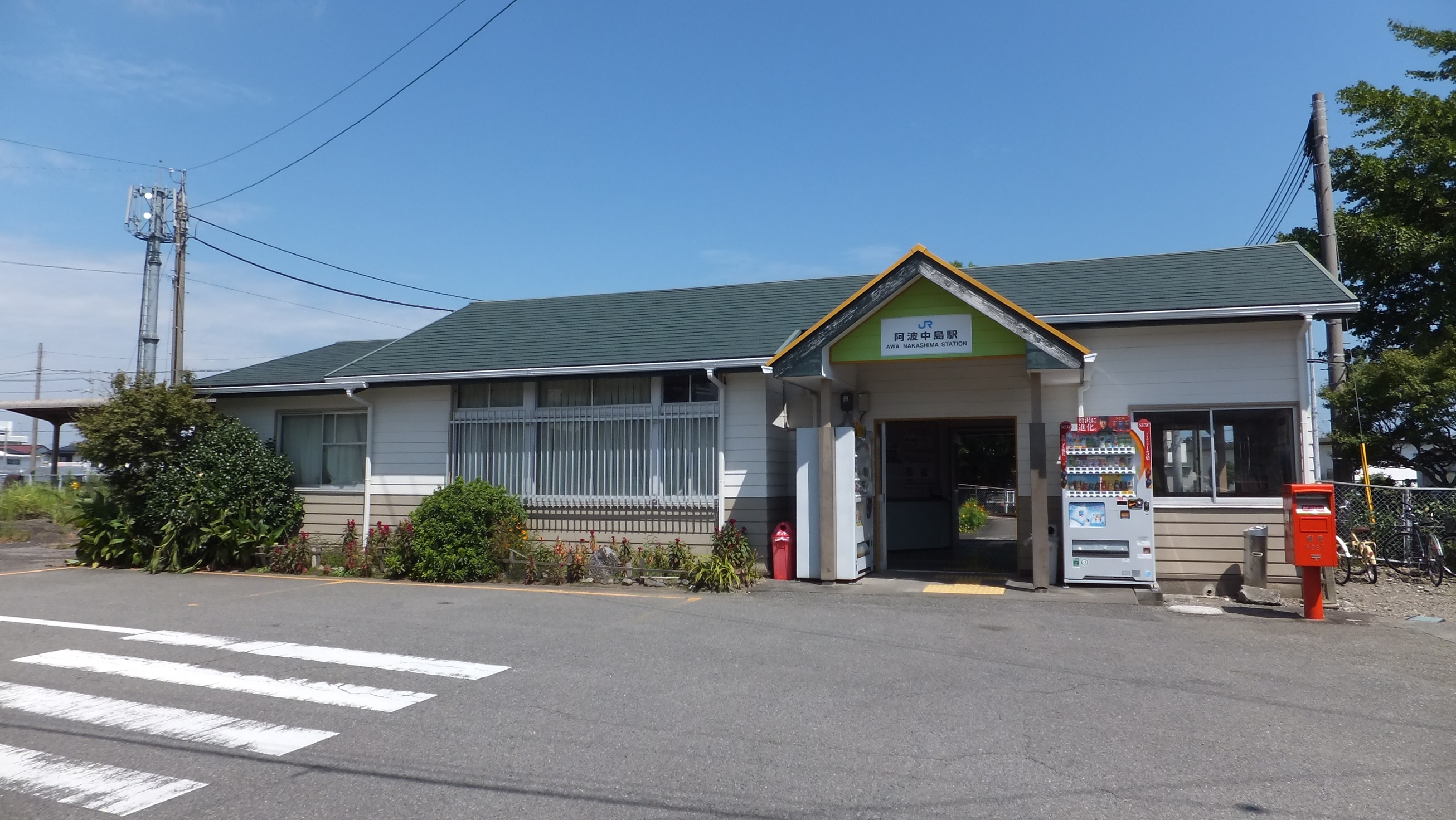 JR牟岐線 阿波中島駅 （徳島県阿南市）